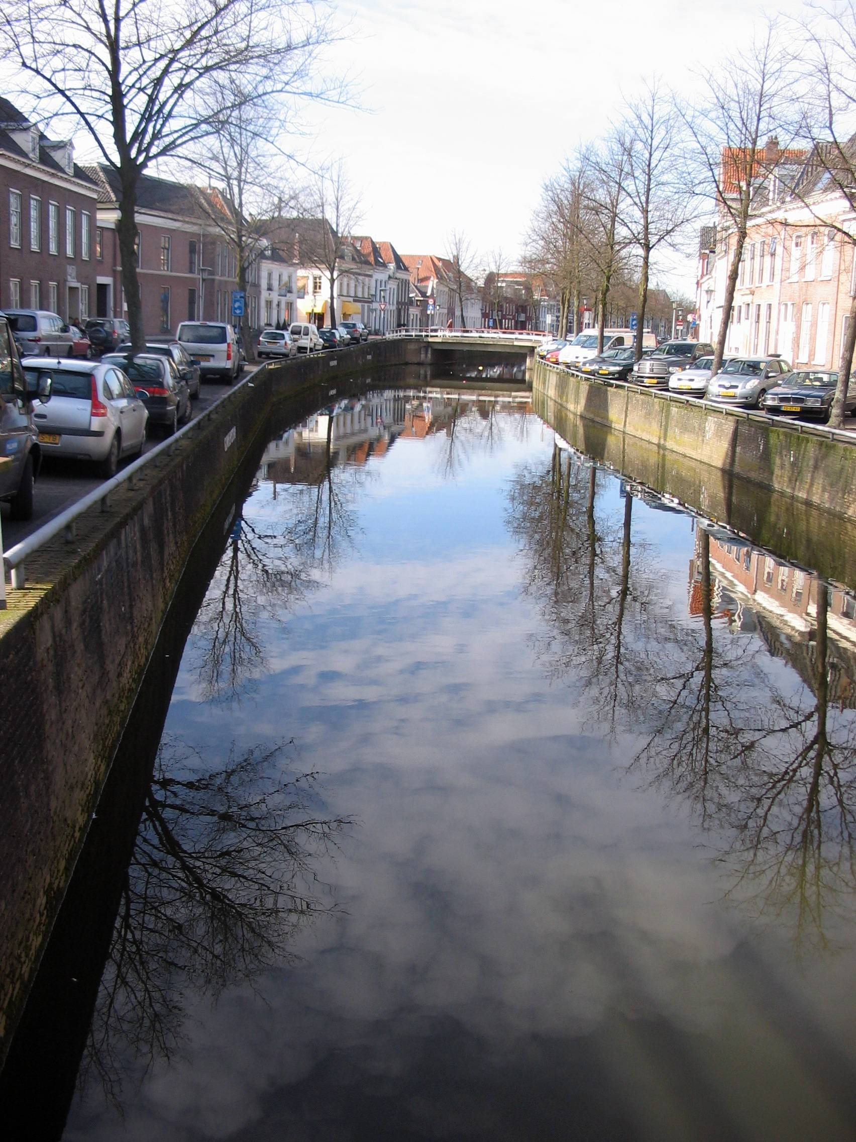 Kampen - "Burgel", stadsgracht tussen Vloeddijk en Burgwal. Tot de 15e eeuwse uitleg van de stad Kampen stadsgracht. In huidige gedaante een aantrekkelijk water, dat voor het karakter van een aanzienlijk deel van de stad mede bepalend is.